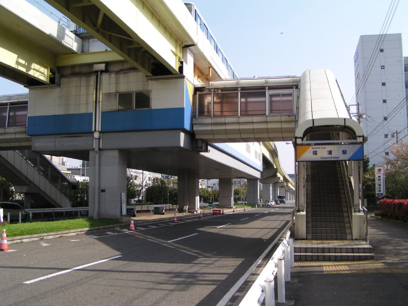 2005年4月17日に投稿者がja:福浦駅で撮影。右側の建物は、ソーテック福浦リペアセンターの管理棟。